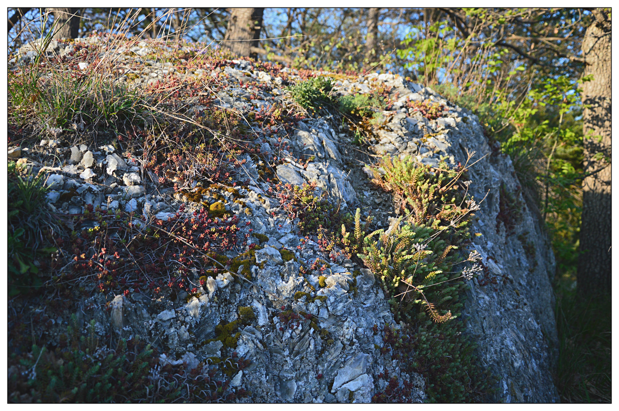 Piantine su gesso